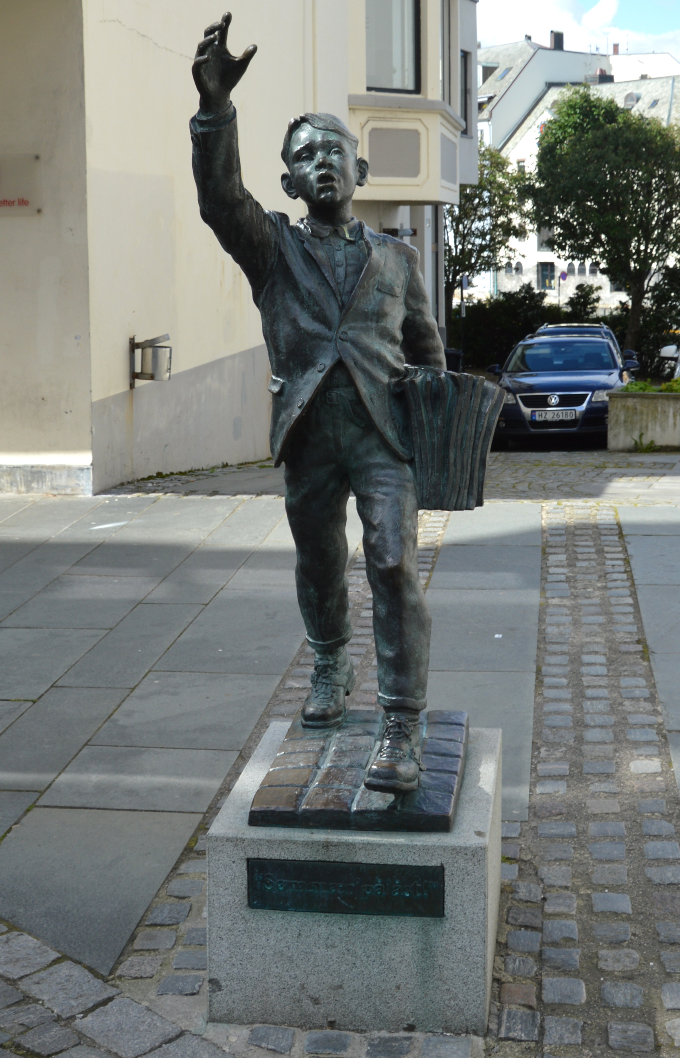 Skulptur Avisgutten in Alesund